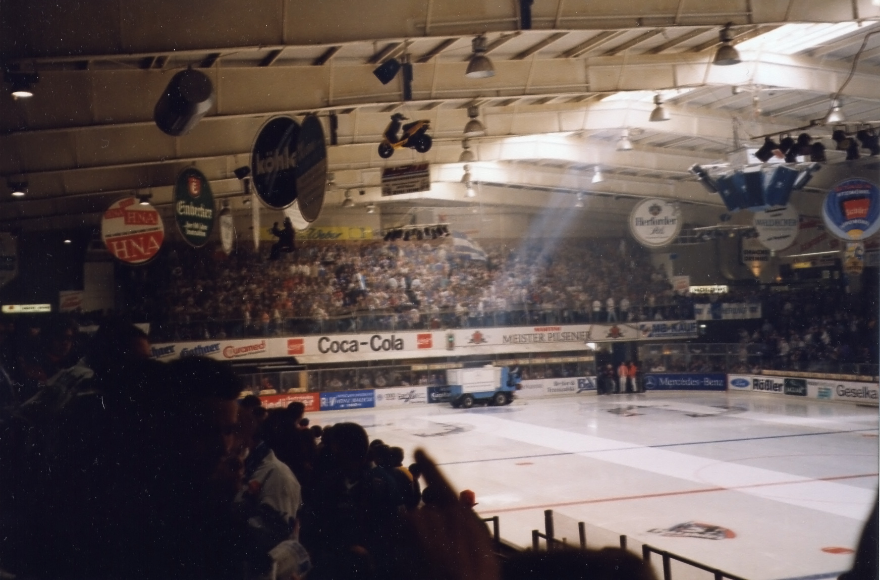 Eishalle Kassel, 1997 Source: self taken by David Herrmann